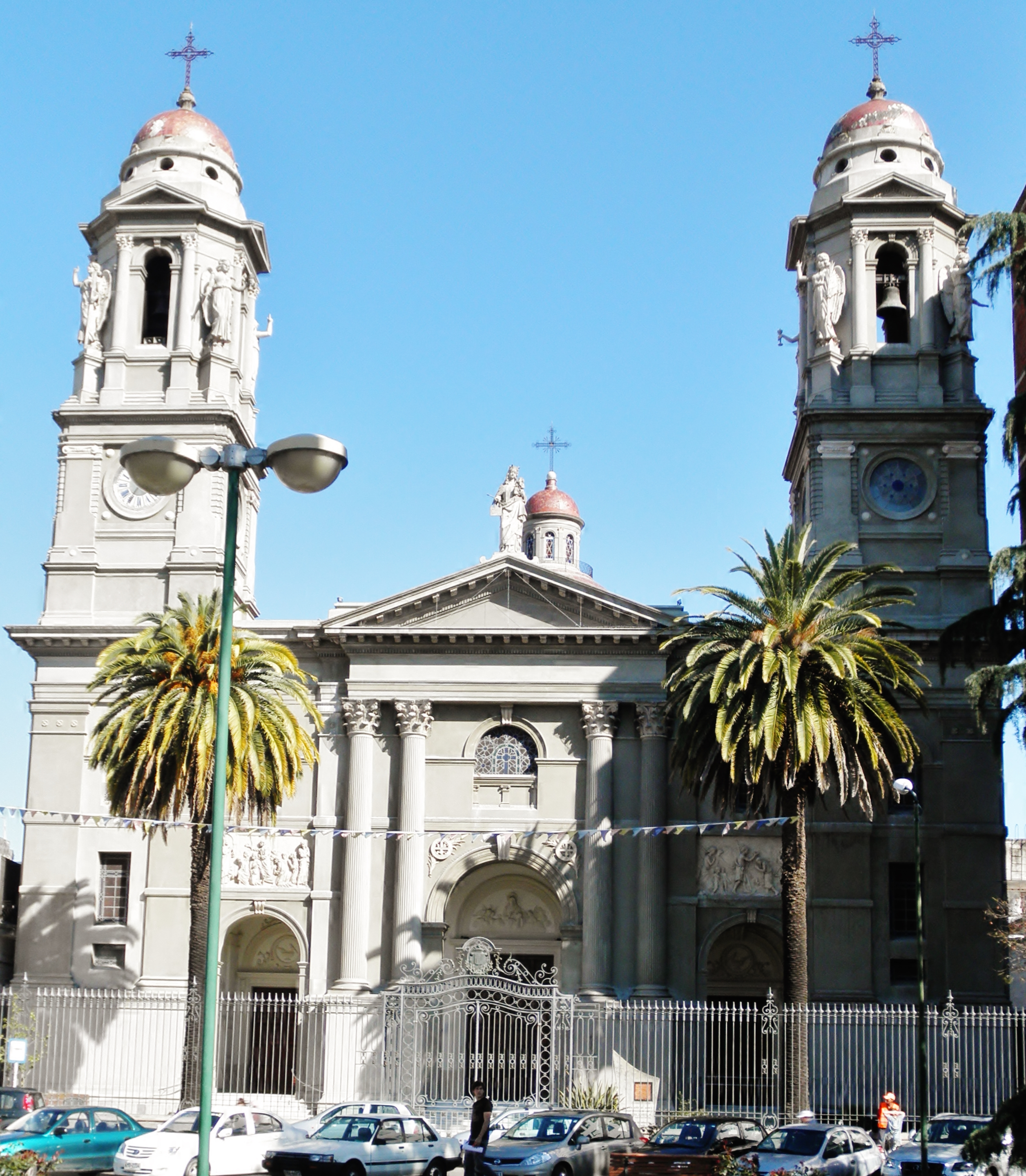 Catedral de Mercedes. Ubicada en el departamento de Soriano